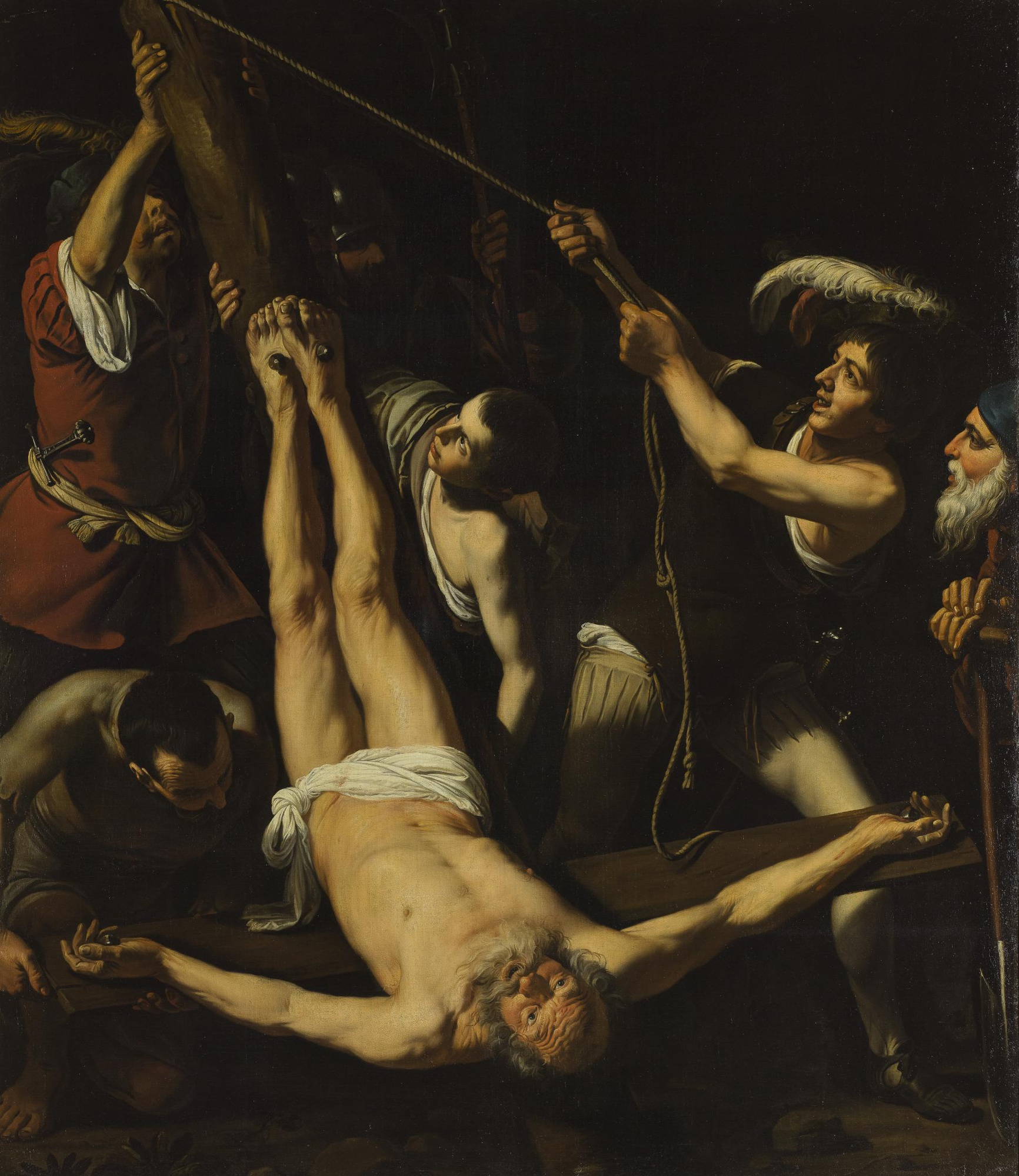 "Martirio de san Pedro", conservado en el Museo de Hermitage (San Petersburgo, Rusia) Autor: círculo de Caravaggio (tal vez Lionello Spada) El cuadro podría mostrar la primera versión de "La crucifixión de san Pedro", de Caravaggio, que está desaparecido desde el siglo XVIII. Perteneció, como diversas obras de Caravaggio, a la colección Giustiniani, de donde fue comprado para el Hermitage.